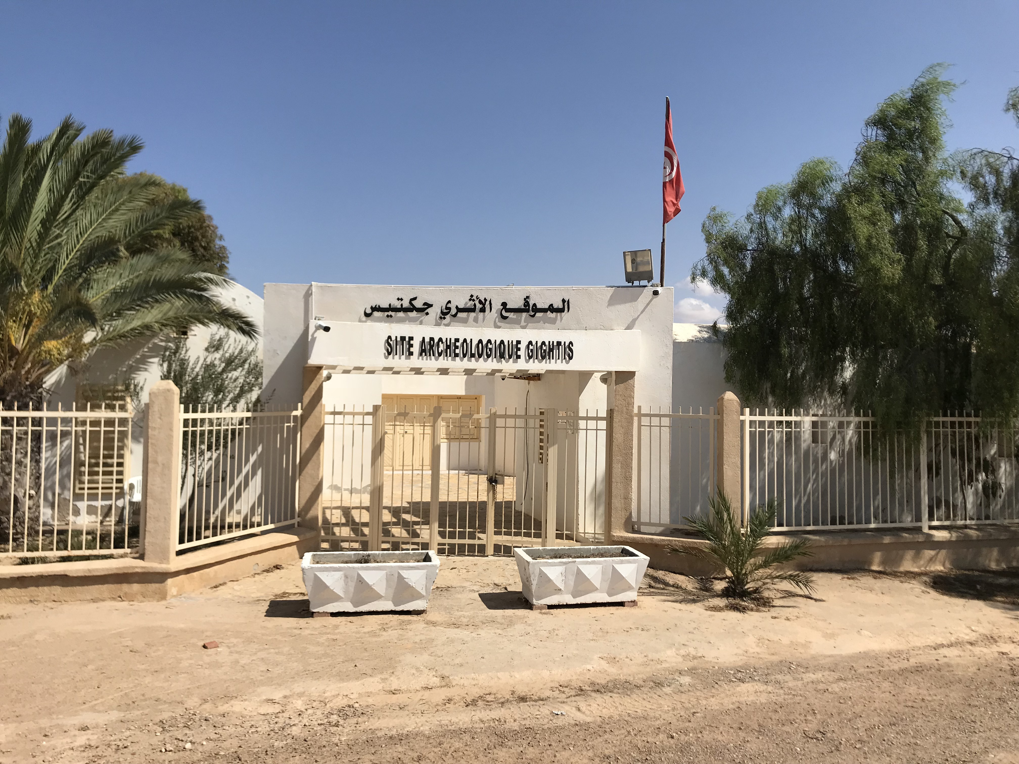 Entrée du site archéologique de Gigthis, 19 août 2018.